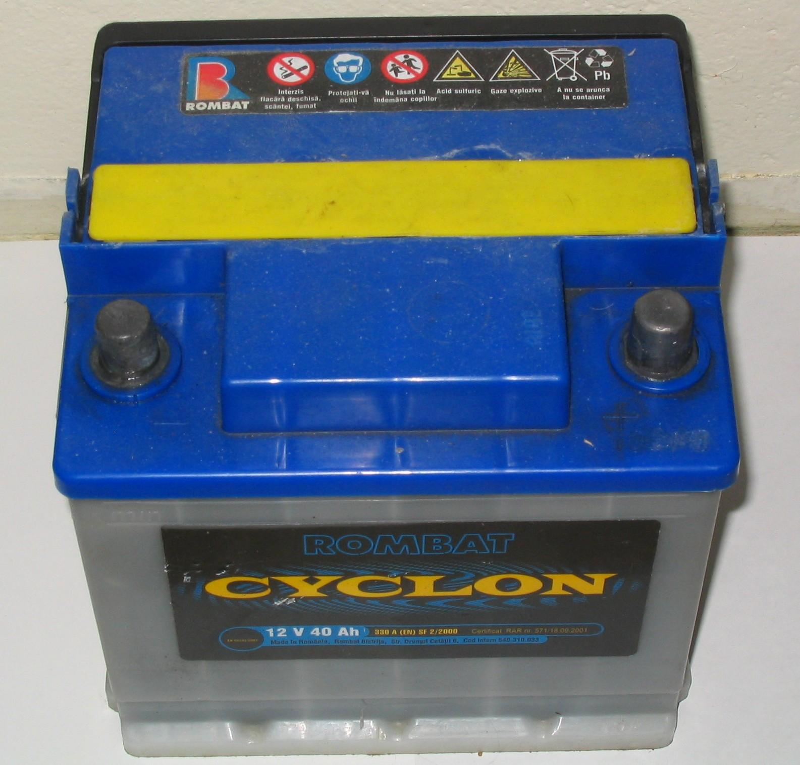 Acumulador para automóvil. Description: Car battery Author, date of creation: selfmade by Shaddack, 6 November 2005 Source: self-made Copyright: Public Domain (PD) Comments: Lead-acid battery for car, side-top view